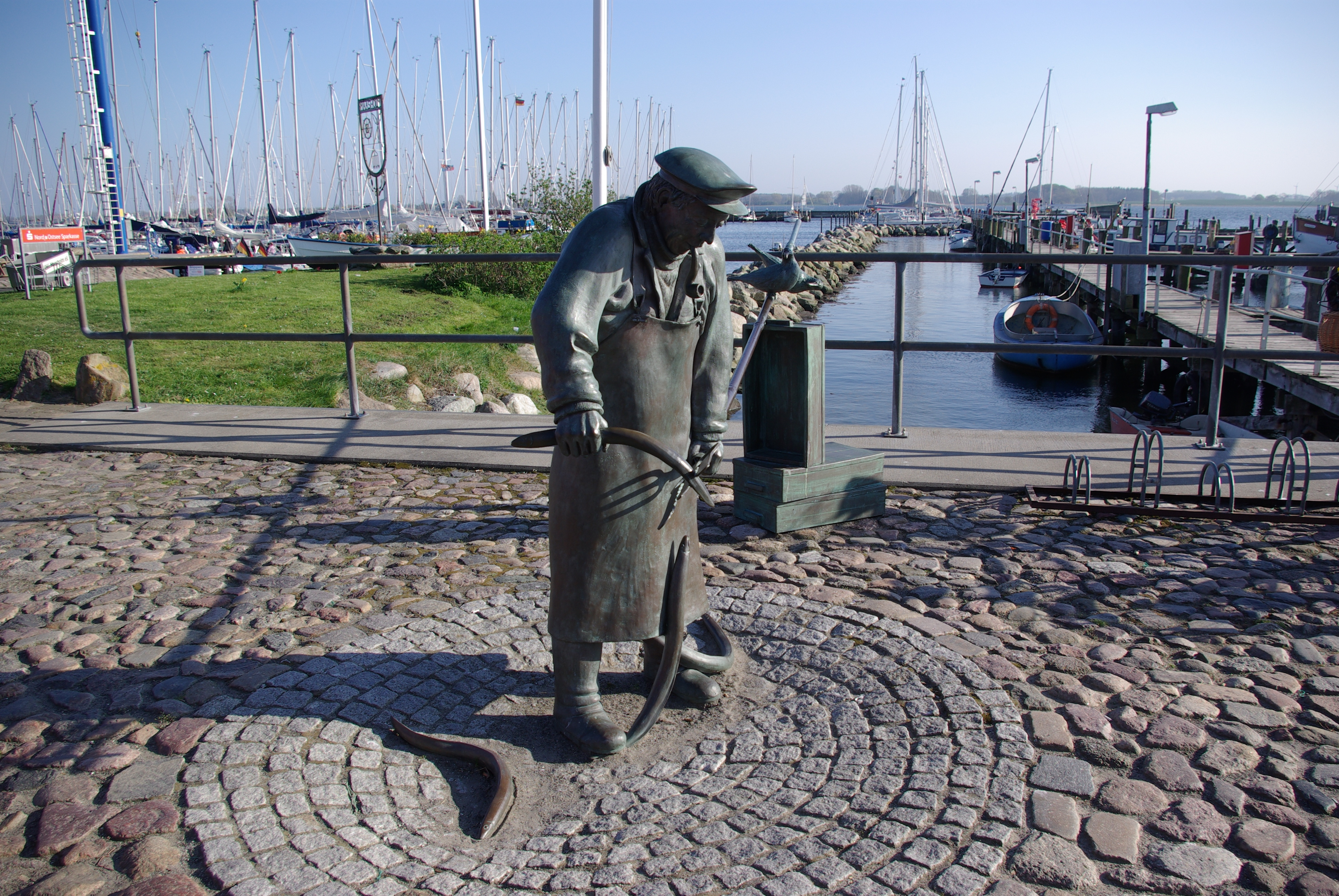 Maasholm in Schleswig-Holstein. Die Plastik Peter Aal steht am Hafen. Die Plastik hat Bernd Maro, Hannover erstellt.